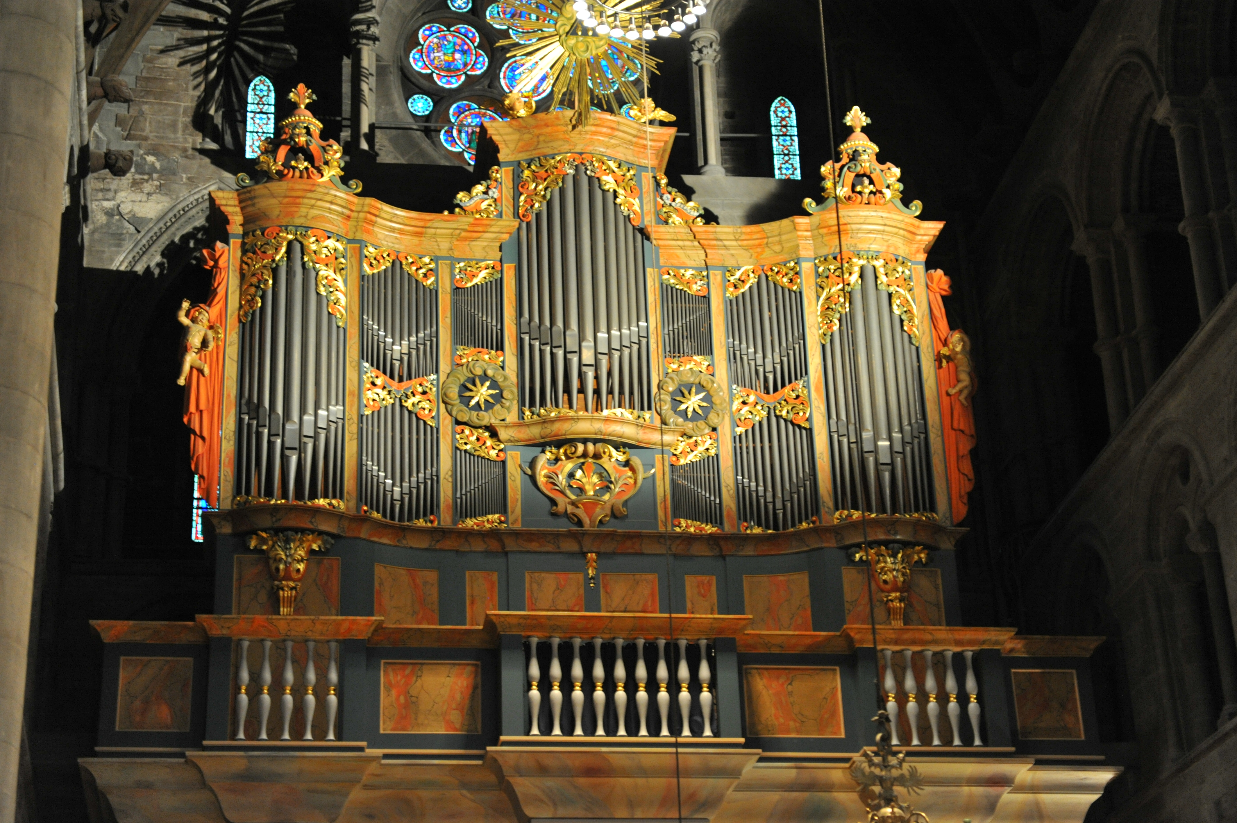 Wagner-Orgel des Nidarosdoms, Trondheim, Norwegen